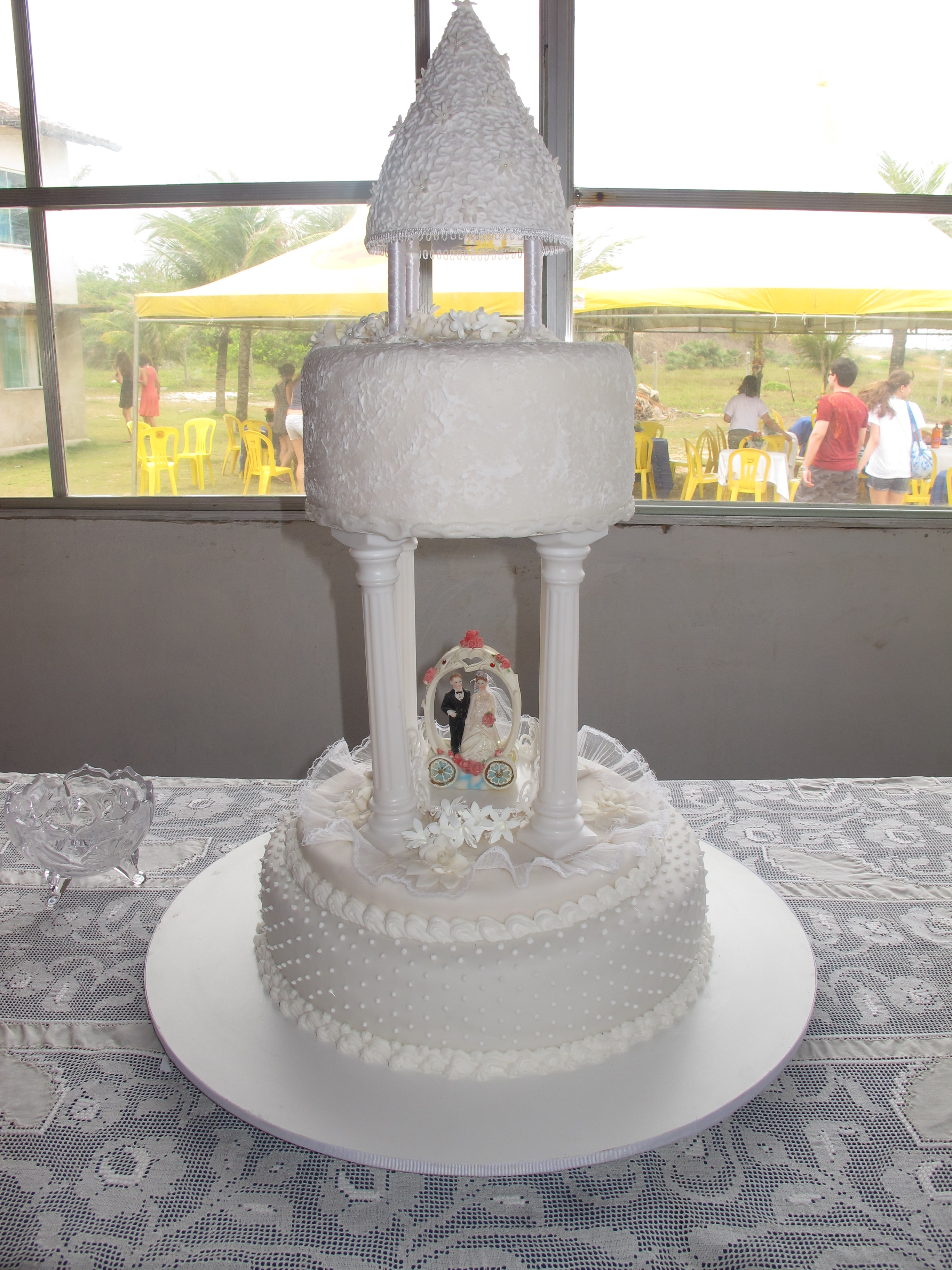 Bonecos em bolo da cidade de Alcobaça, Bahia, Brasil.